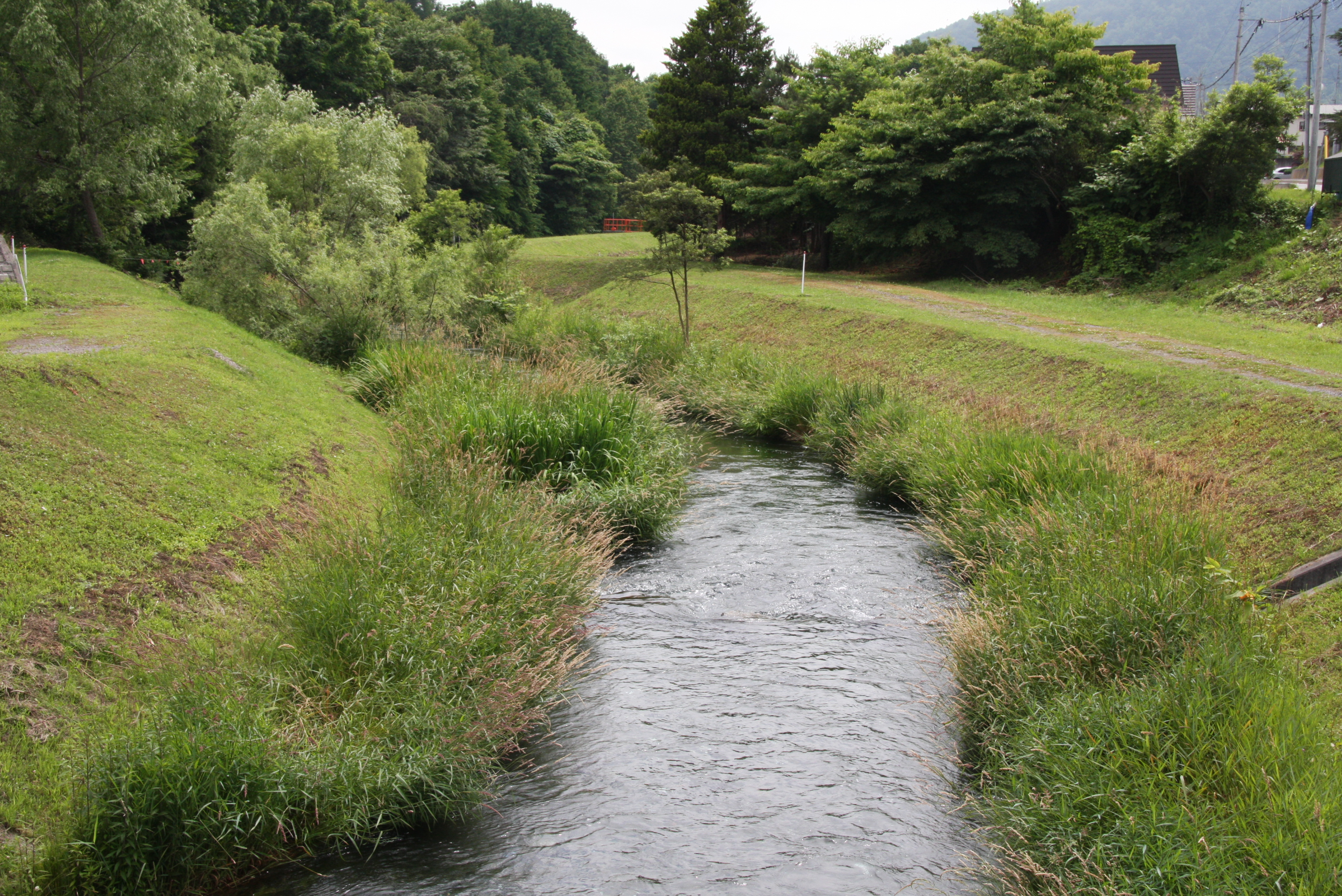 壮瞥川 栄橋より下流を望む